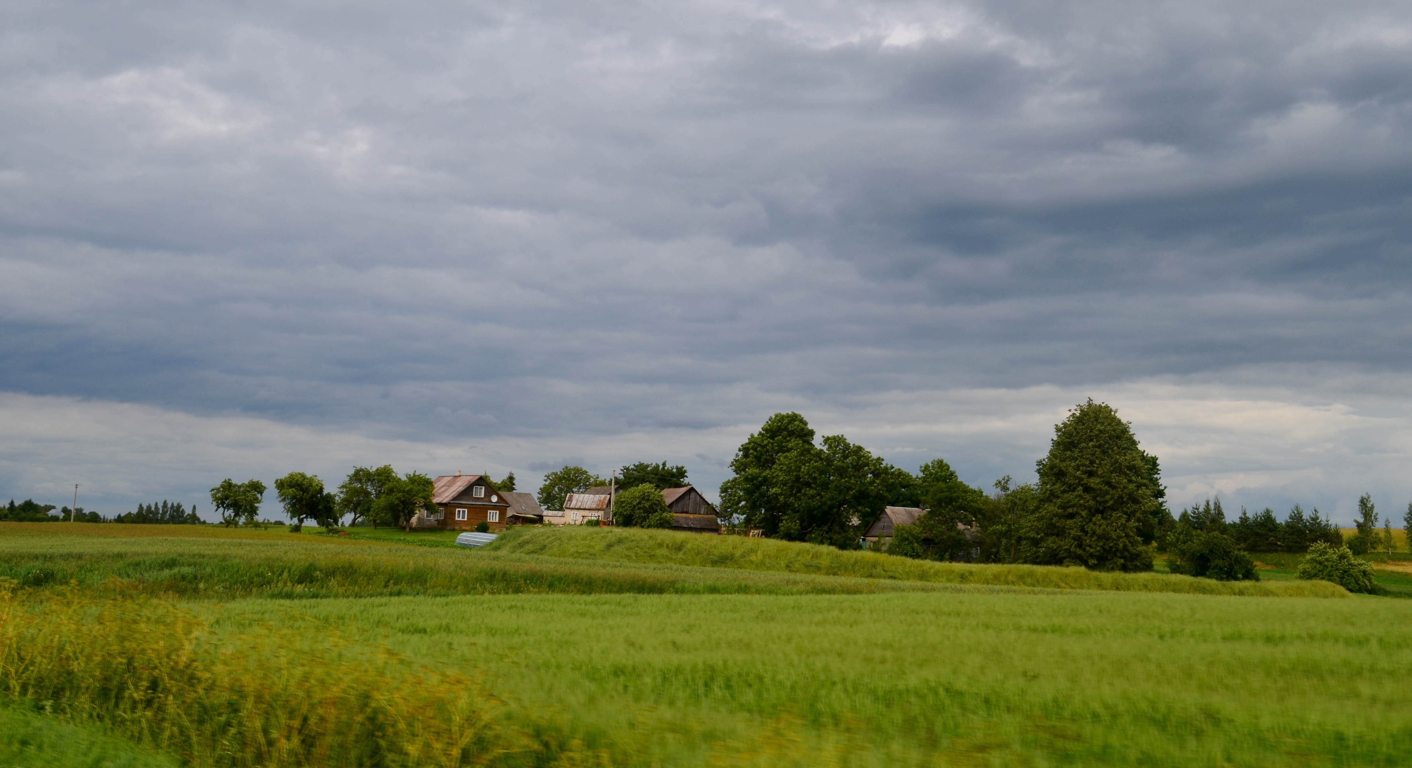 Kašonys, Prienų raj.